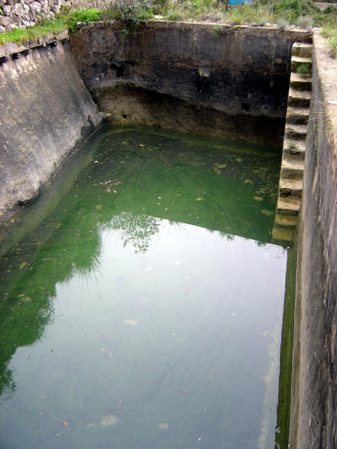 Safareig